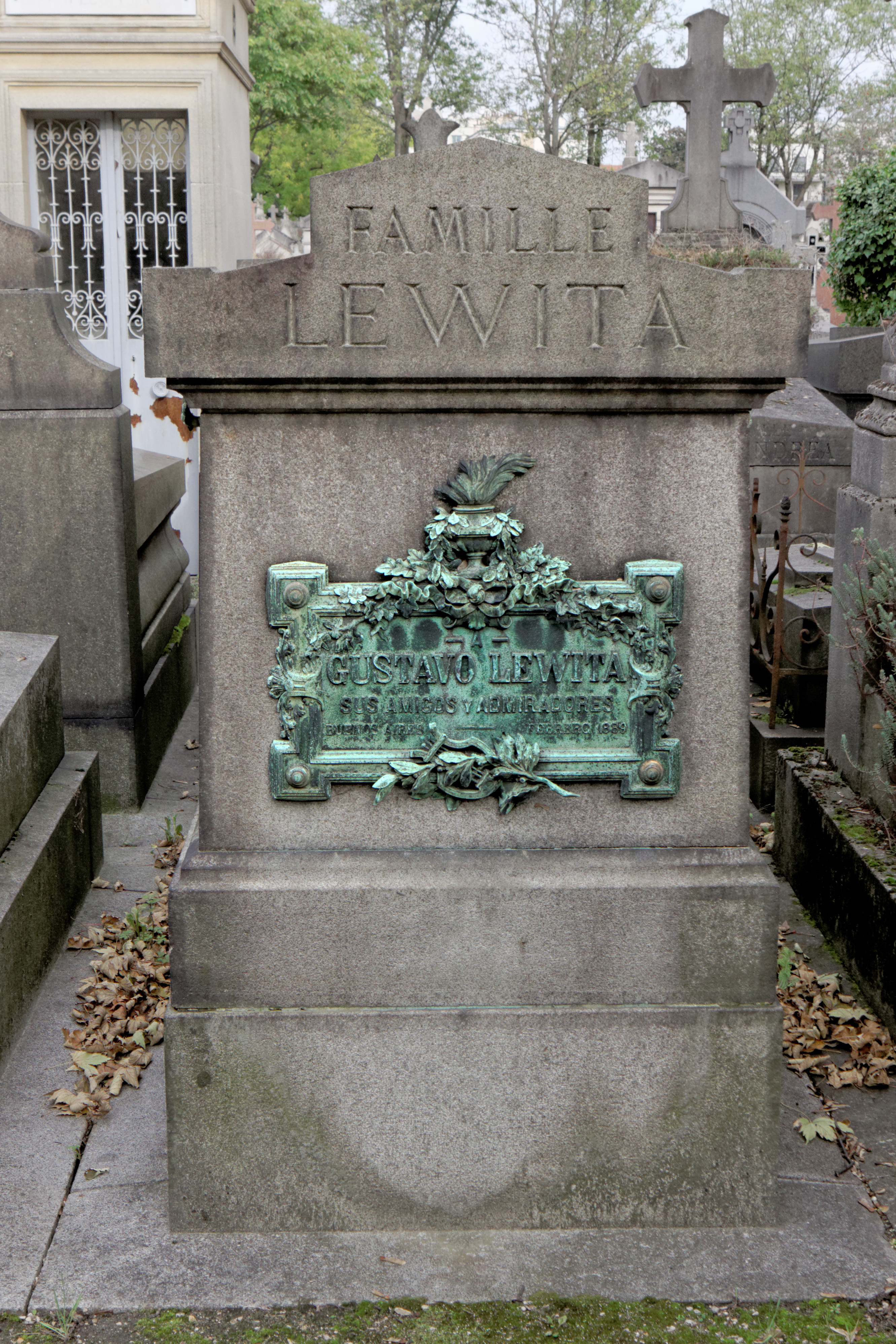 Sépulture de Gustave Lewita (1853-1889), pianiste polonais.